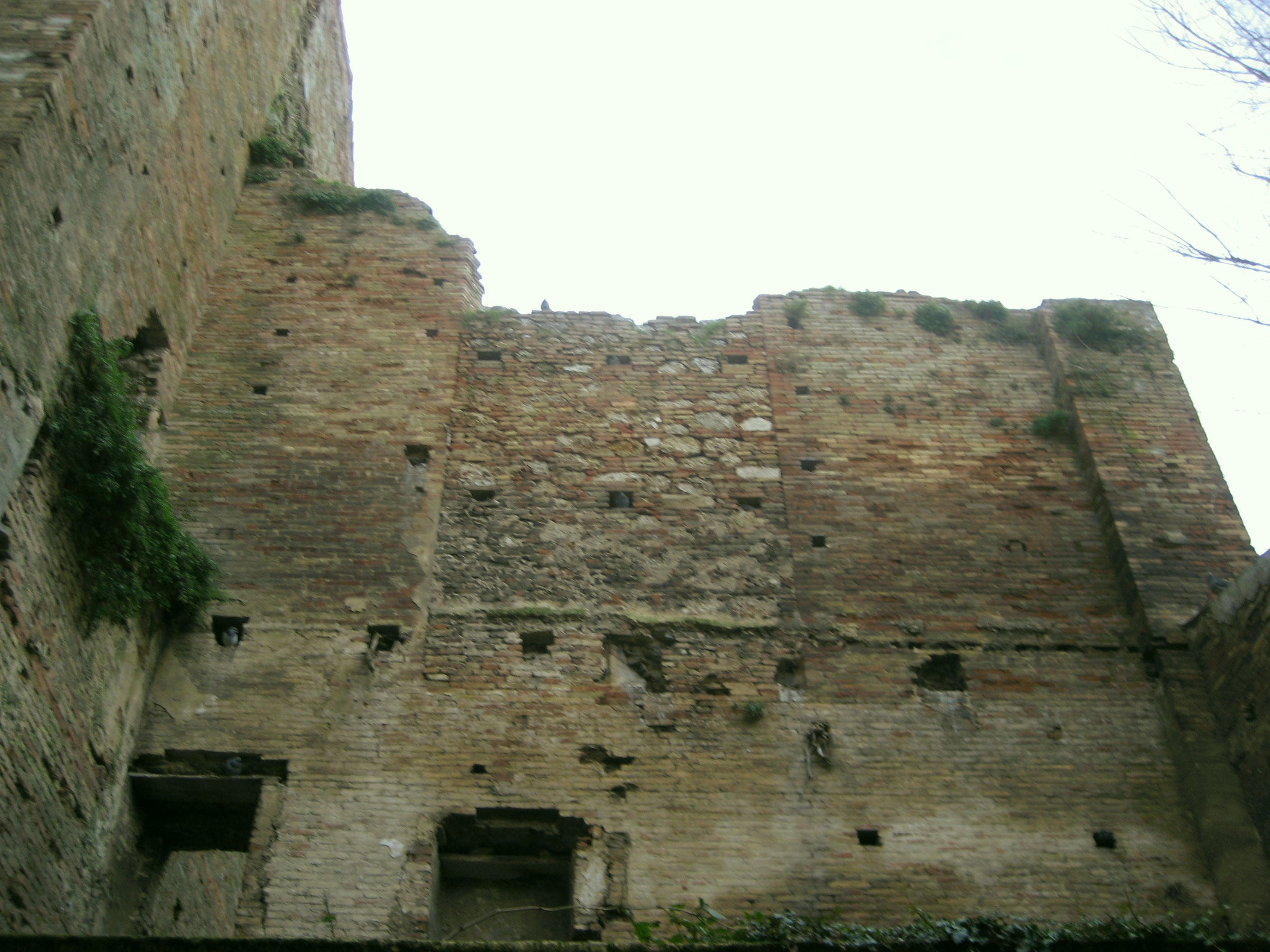 I resti della chiesa medievale di San Francesco (1226), dietro l'attuale edificio in stile barocco. Atri, Via Probi.